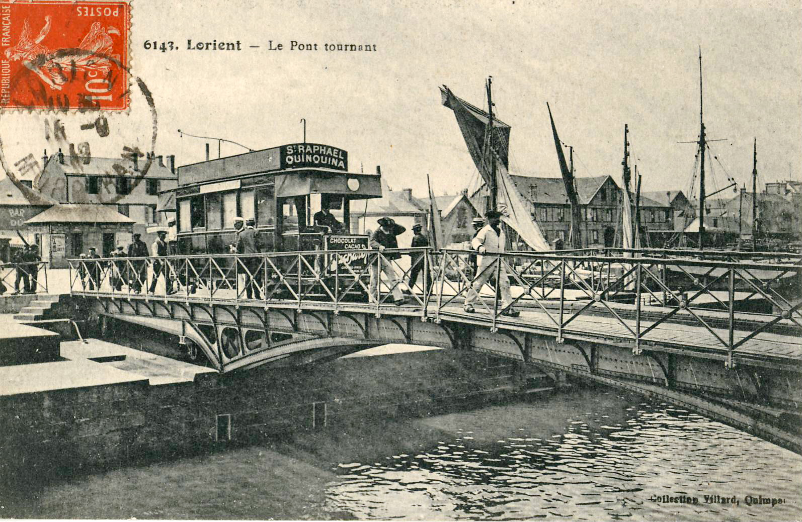 Carte postale ancienne éditée par Collection Villard à Quimper, n°6143 :QUIMPER - Le pont tournant